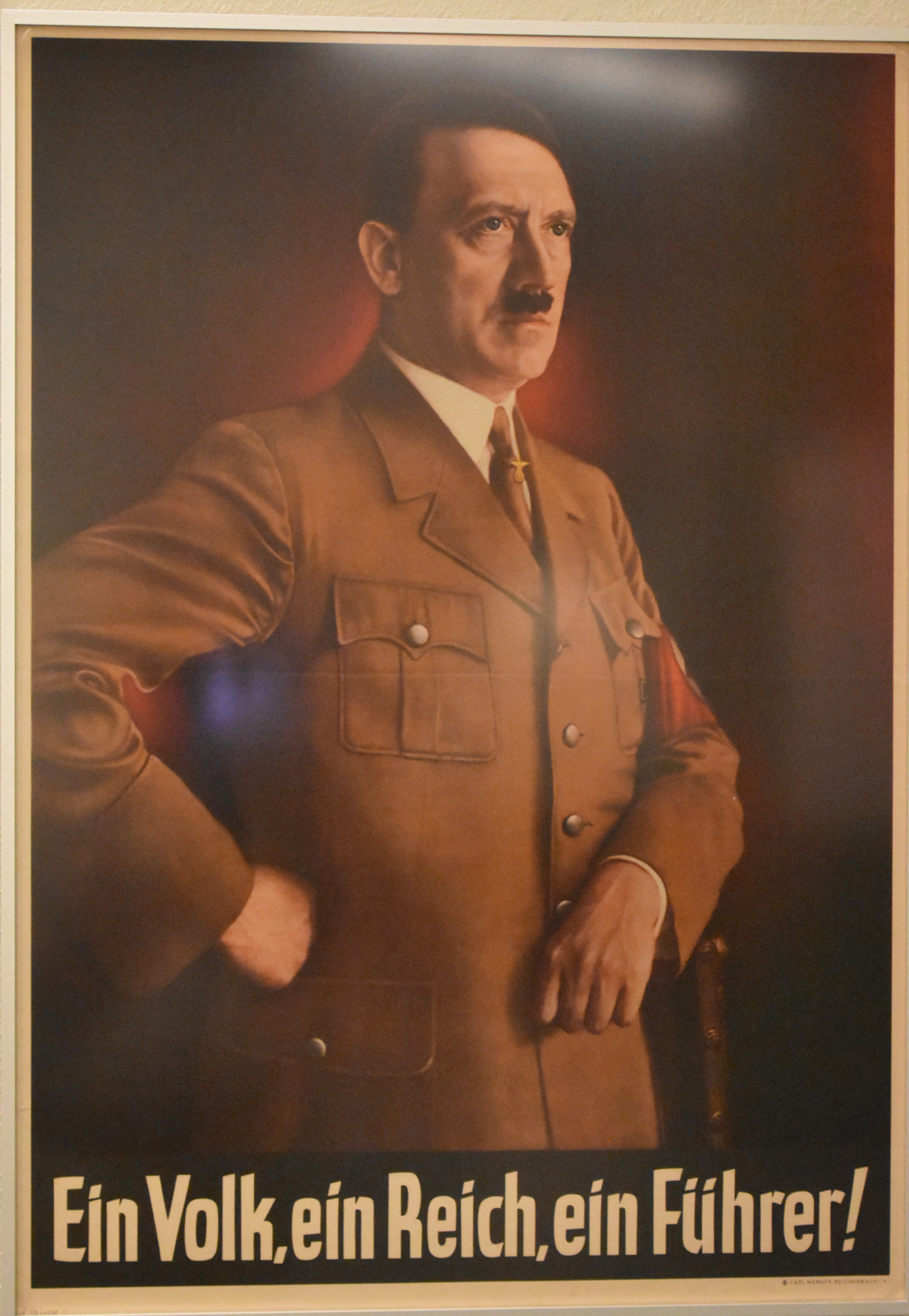 The Poster is of 1938, see Wolfgang Paul, Jahrhundert der Bilder, 2009, S. 448 Color poster with a portrait of Adolf Hitler and the Nazi slogan: Ein Volk, ein Reich, ein Führer!, based on a painting by Heinrich Knirr in 1935-1936. Deutsches Historisches Museum, Berlin